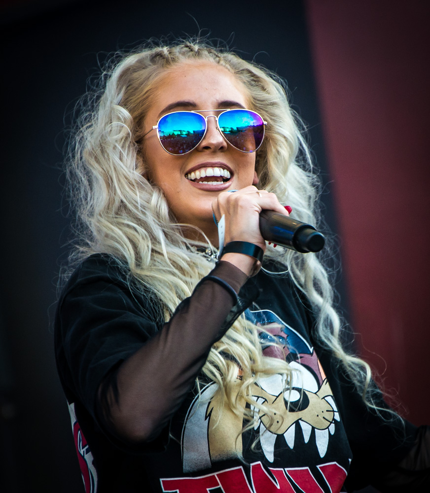 Peg Parnevik under RIX FM festivalen i Kungsträdgården i Stockholm den 24 augusti 2016.